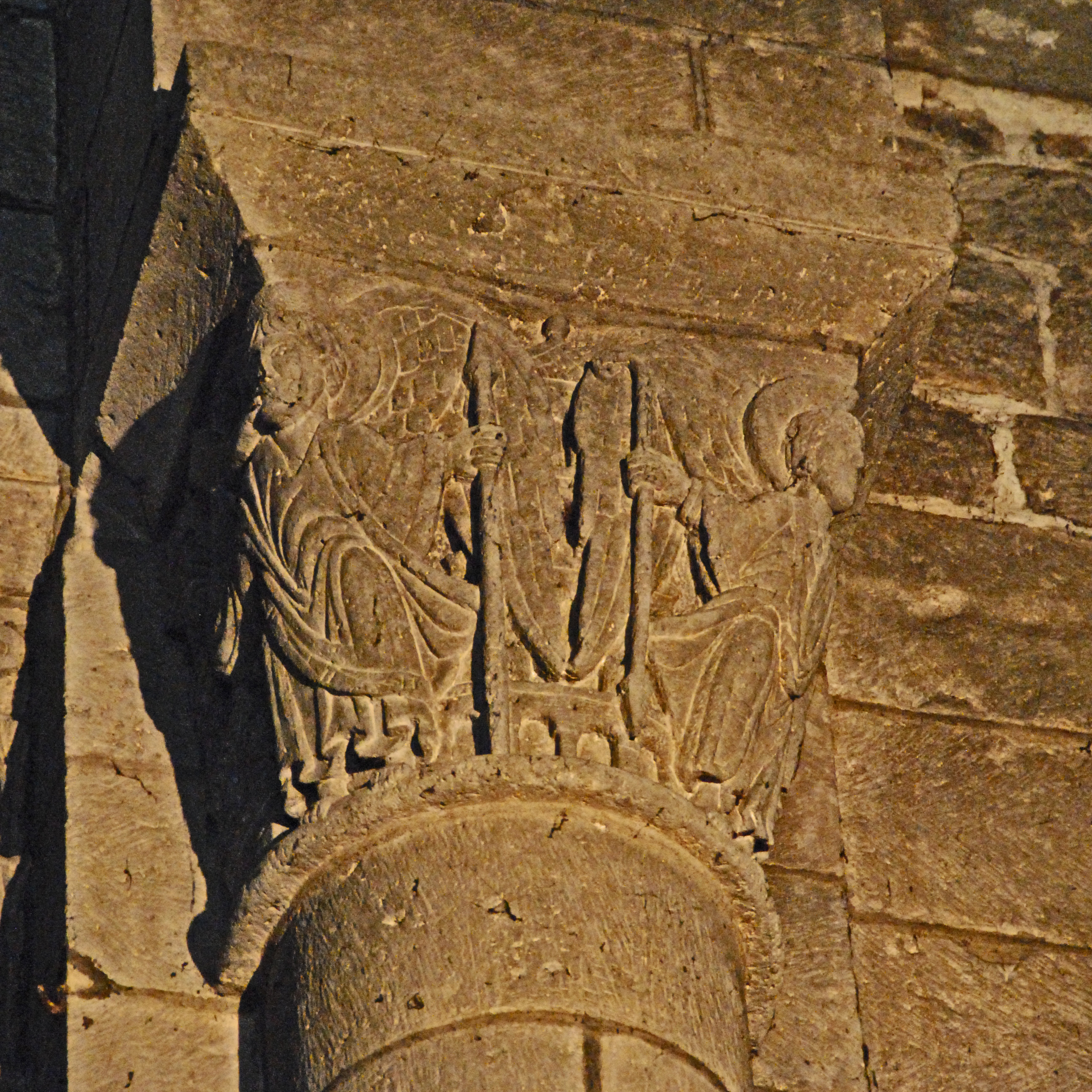 N.-D. d'Orcival, Umgangskapitell, Engel als Wächter